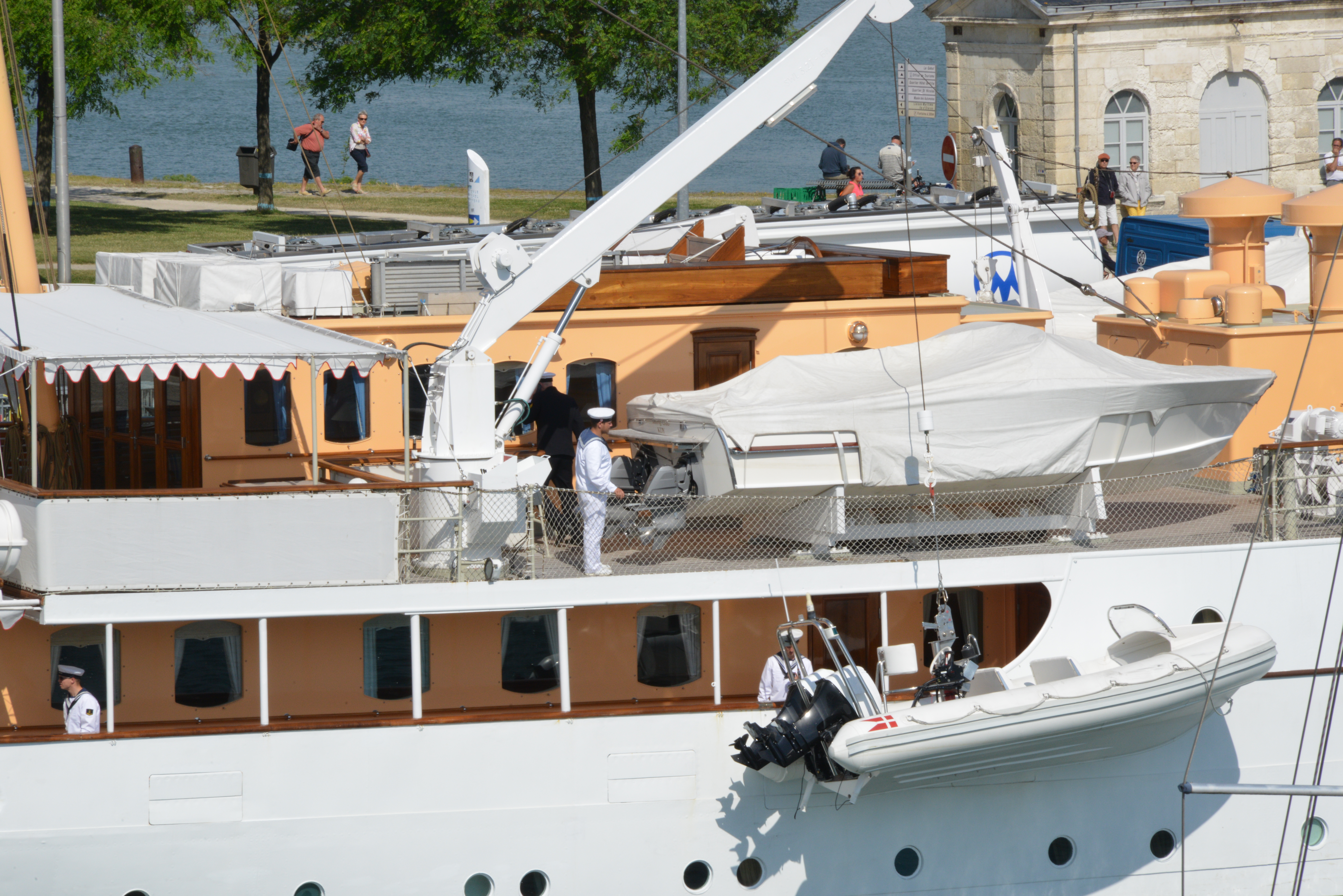 Des matelots du Dannebrog s’occupent du bateau pneumatique semi-rigide. Photographie prise depuis le café de l’Aquarium. Bassin des Chalutiers. La Rochelle, Charente-Maritime, France.